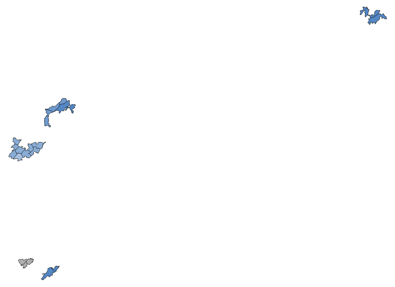 中文（台灣）: 顏色對照表